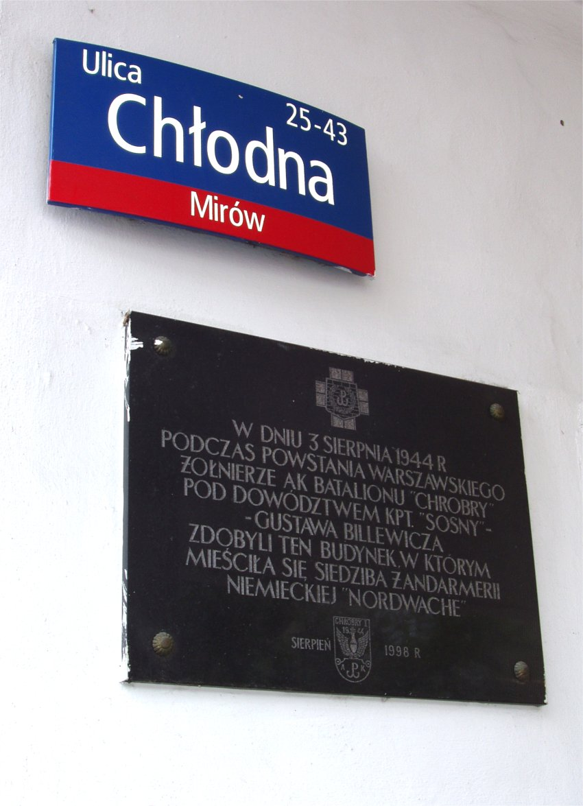 U zbiegu ulic Chłodnej i Żelaznej w Warszawie (fot Zu)